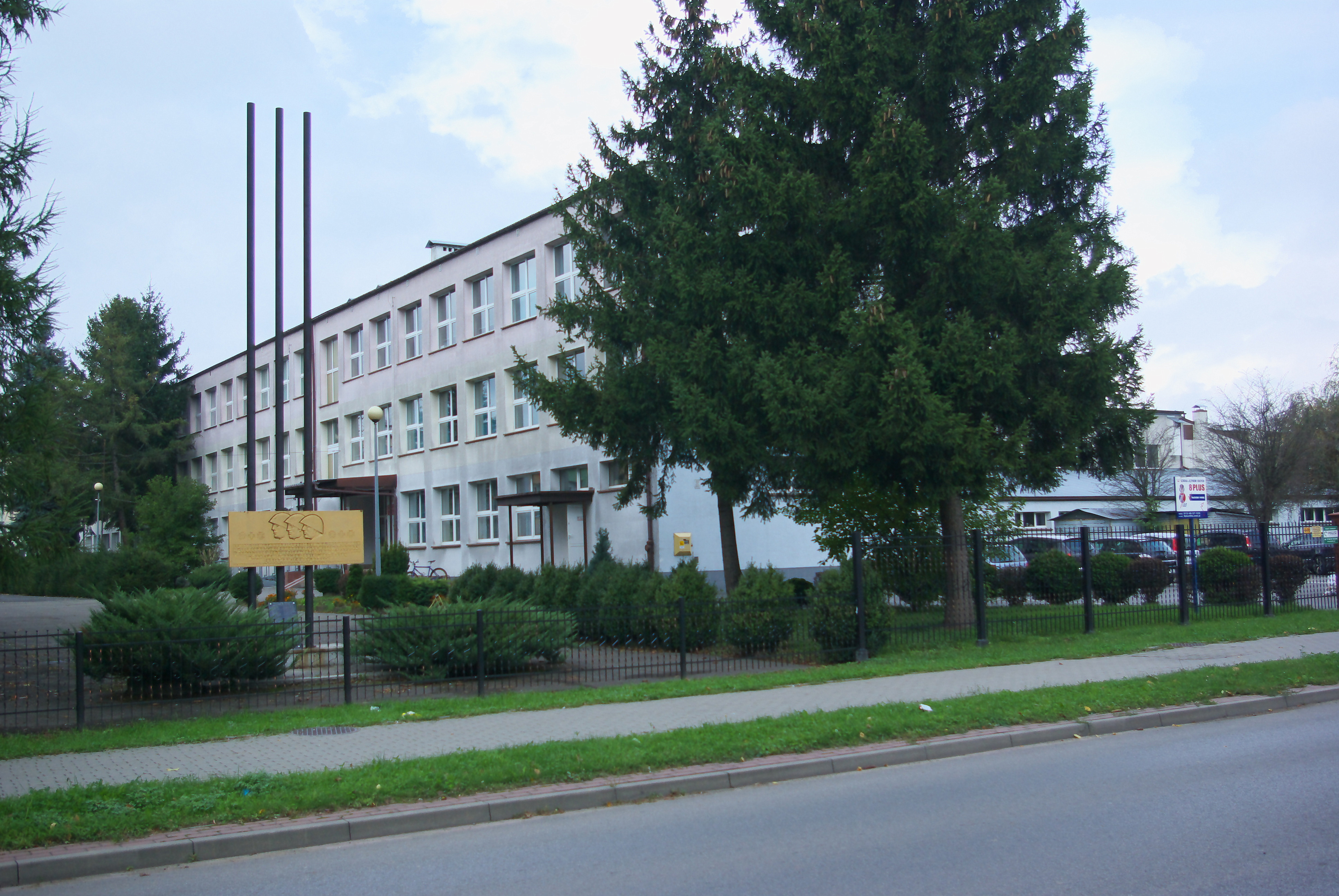 Gimnazjum nr 4 im. 6 Pomorskiej Dywizji Piechoty w Sanoku